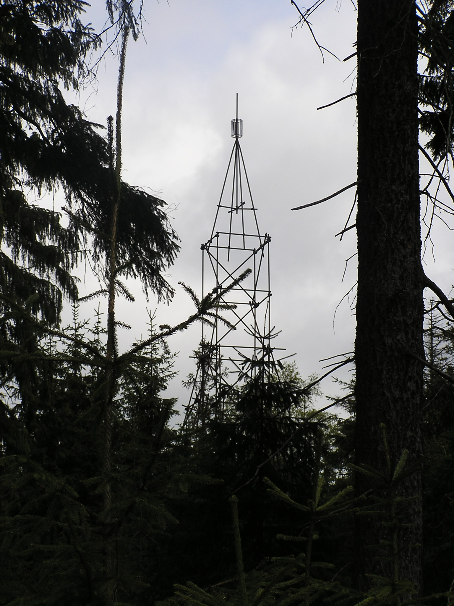 Brdy, věž na Koruně.